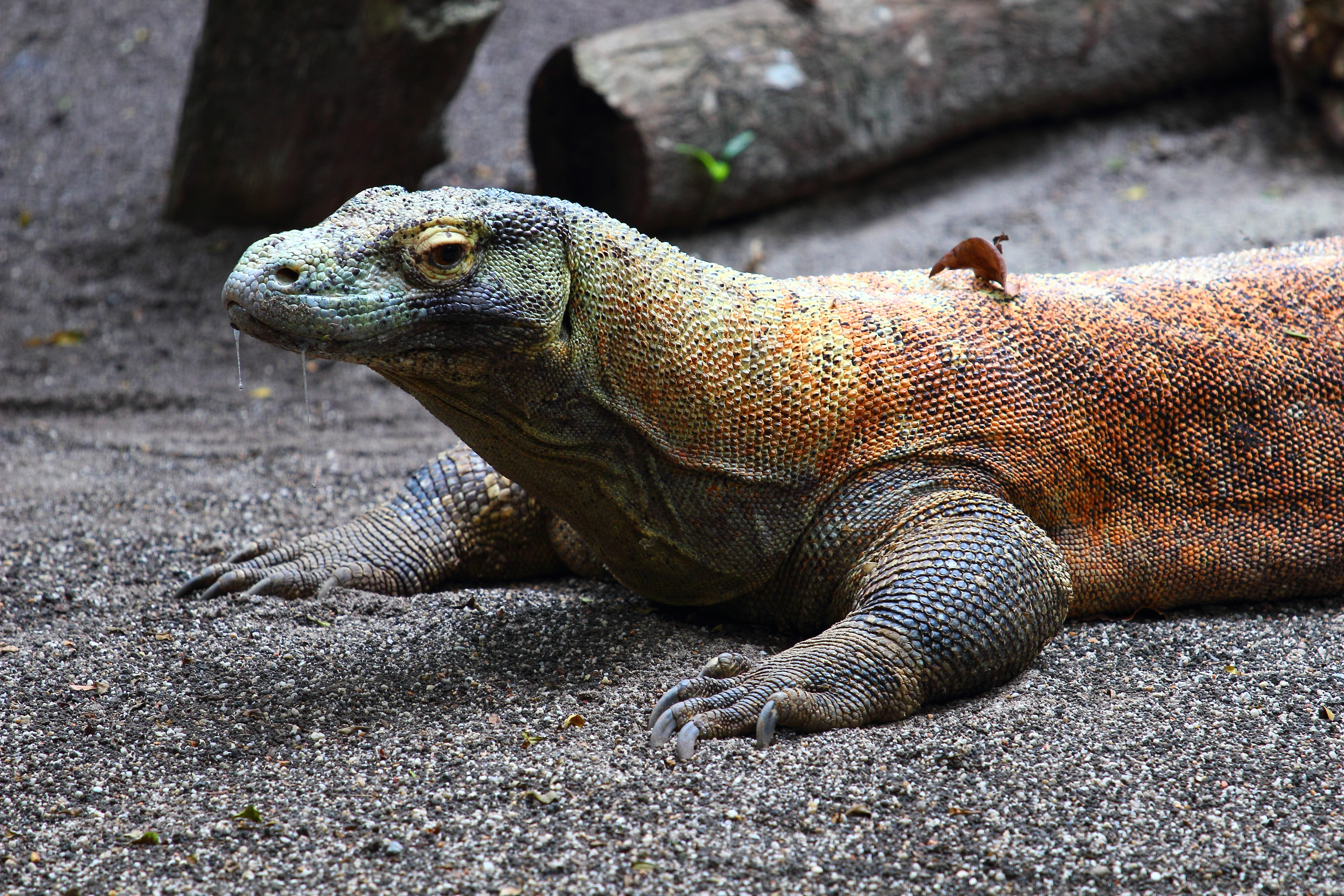 Komodo Dragon